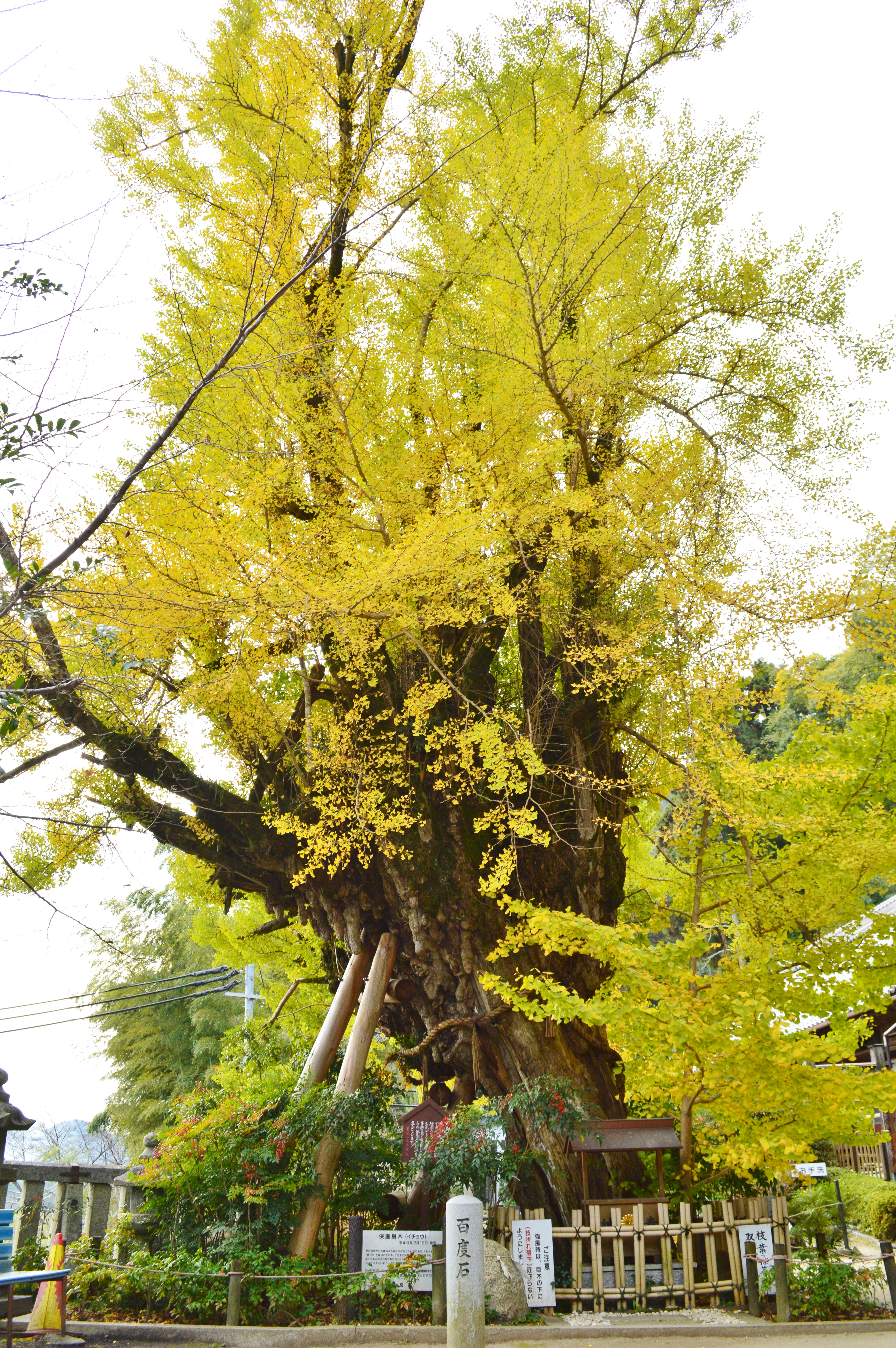 葛城一言主神社 乳銀杏